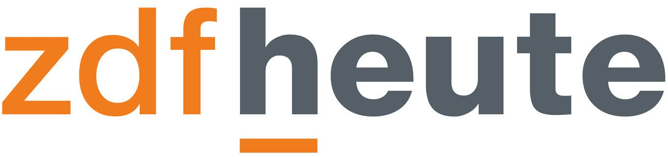 Logo von "ZDFheute"